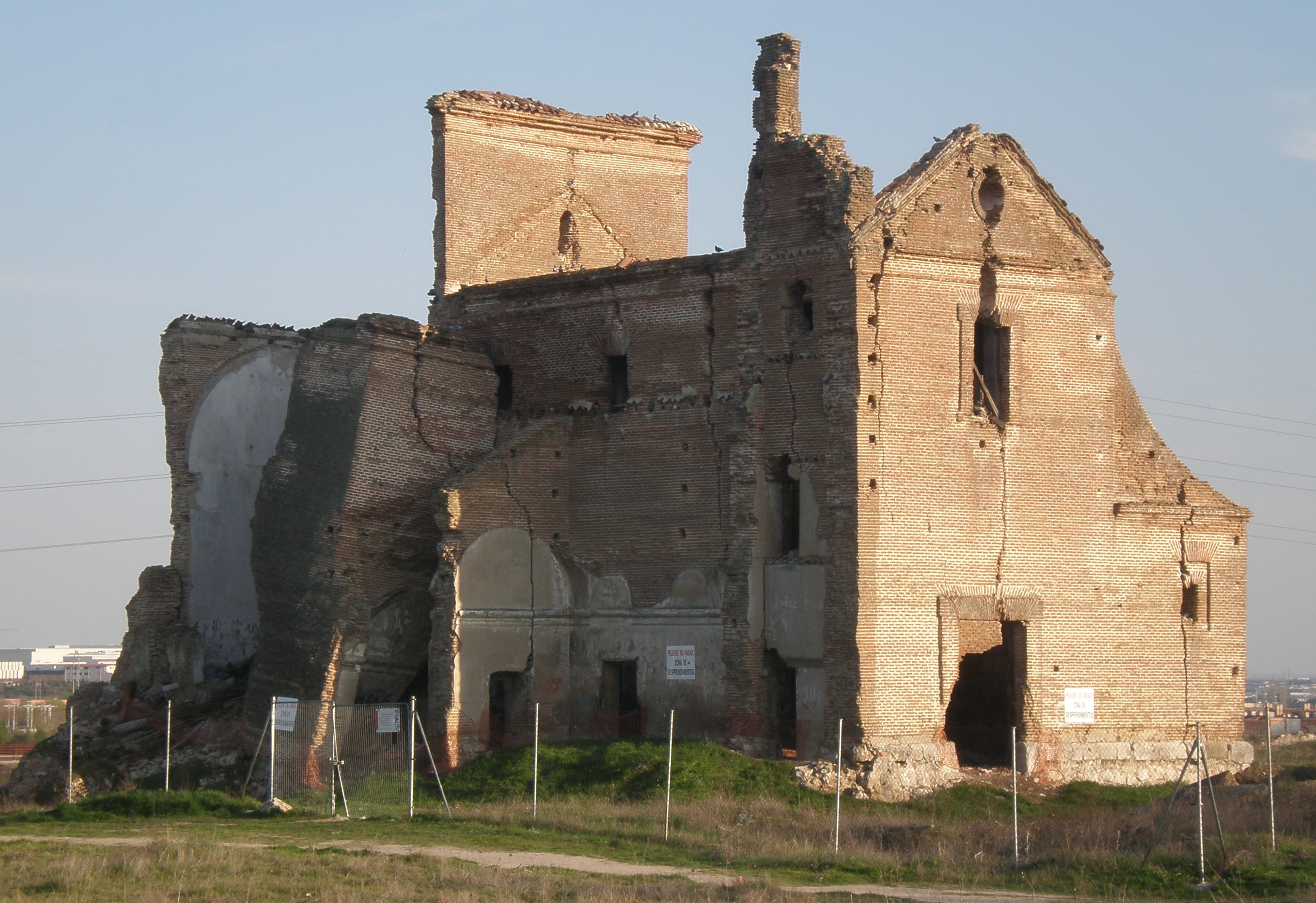 Iglesia de San Pedro - Parque de Polvoranca - Madrid - España